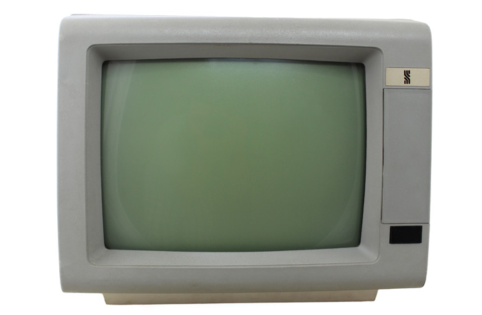 Монитор Правец